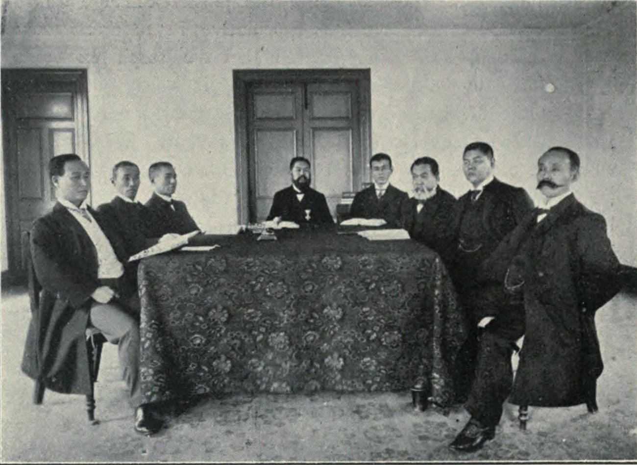 横浜取引所（1894年設立）。左から大浜忠三郎、金子政吉、渋沢作太郎、若尾幾造、竹内広助、渡辺しょうじろう、渡辺文七、岡島政蔵